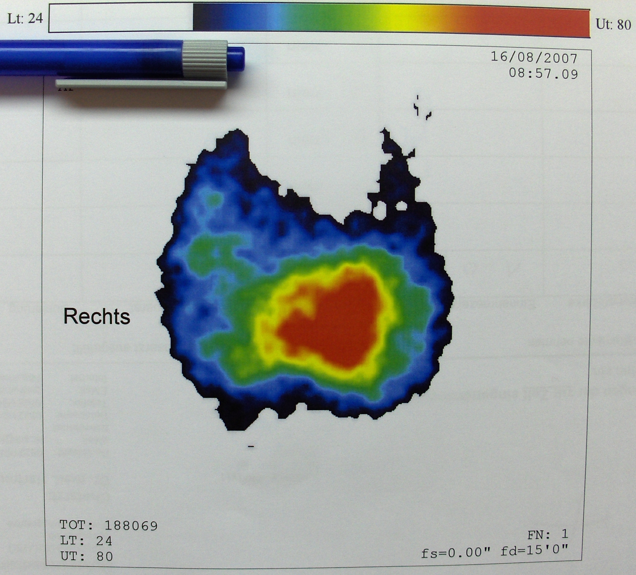 131-Jod-Szintigramm einer Struma mit autonomem Adenom prätracheal